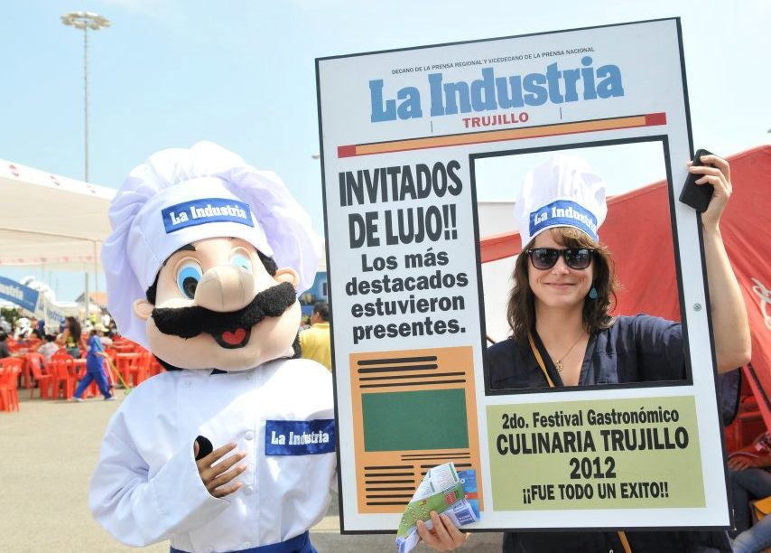 La Industria en feria gastronomica